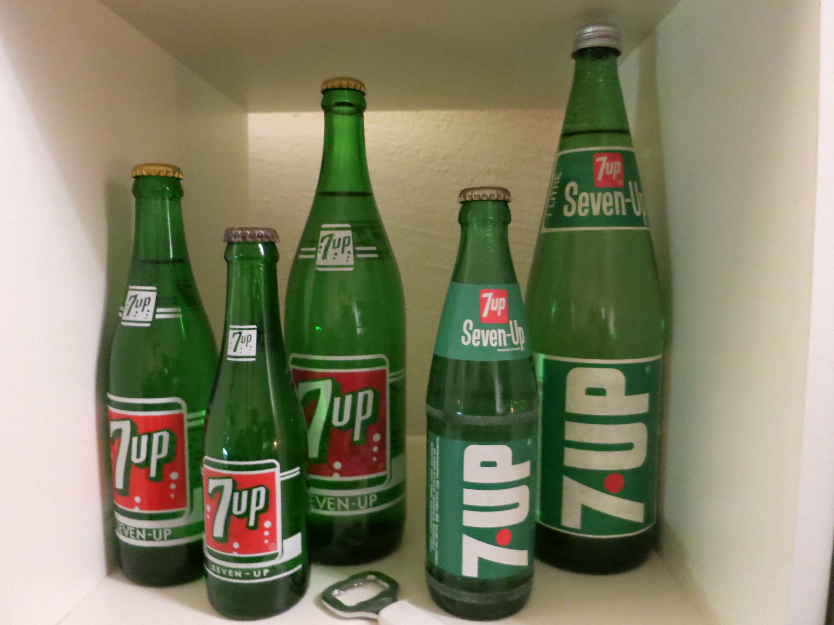 historische Seven up Flaschen, Schweiz